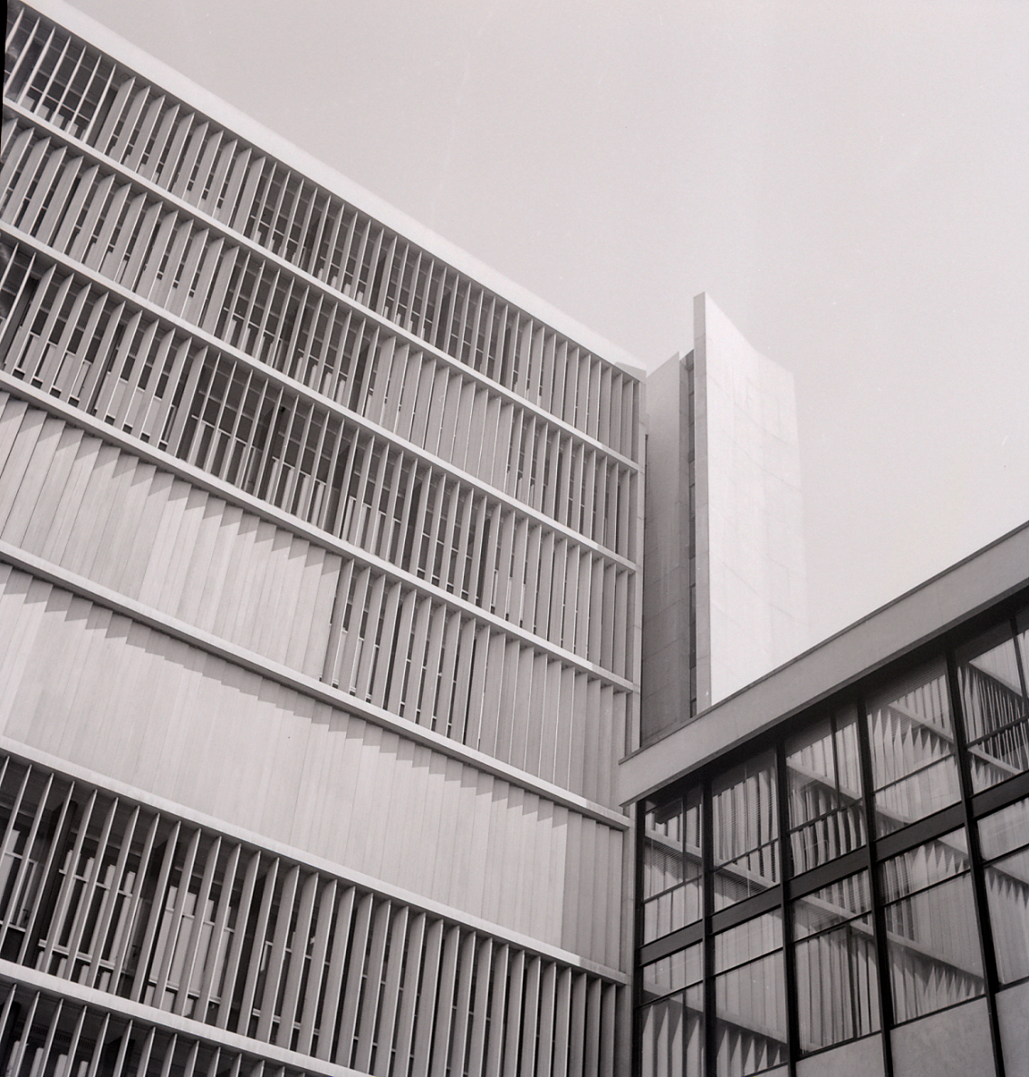 Servizio fotografico : Milano, 1960 / Paolo Monti. - Buste: 9, Fototipi: 9 : Negativo b/n, gelatina bromuro d'argento/ pellicola ; 6x6, 6x9. - ((Serie costituita da 9 negativi identificati con i nn.: 7823-7831. La suddetta serie è contenuta nella scatola identificata con la numerazione R7678-7850. Sul coperchio della scatola manoscritto: "12 - Milano". Sulla busta 7823 manoscritto: "Sede Olivetti Via Clerici Milano". - Via Clerici